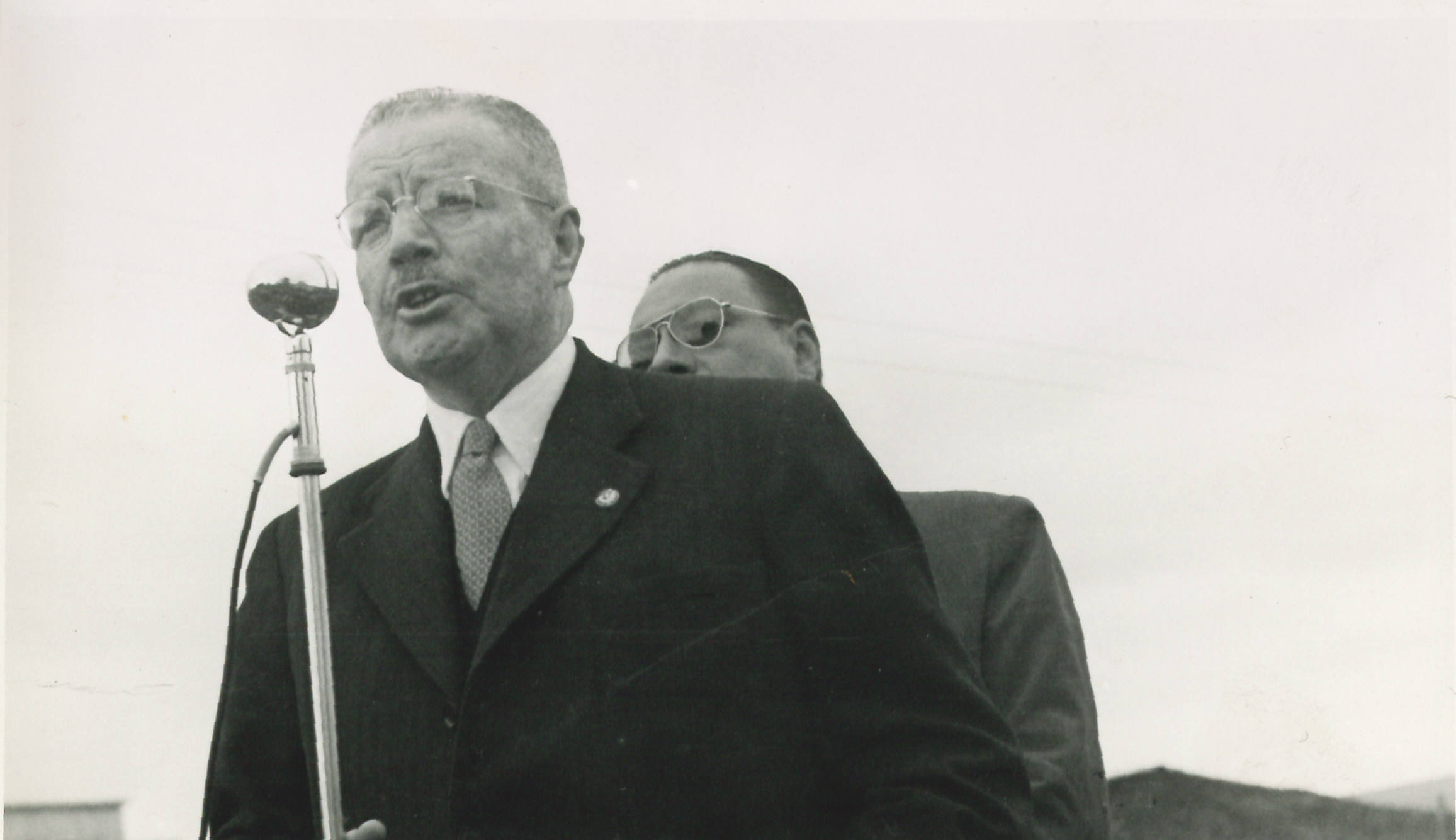 El general Carlos Ibáñez del Campo realiza un discurso durante un acto de campaña como candidato para las elecciones presidenciales de 1952. Alejandro Hales desempeñó un papel clave en su campaña. 1952